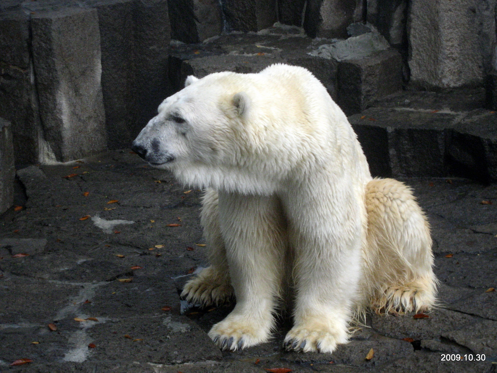 上野動物公園, Ueno Zoo（Ueno Zoological Gardens）